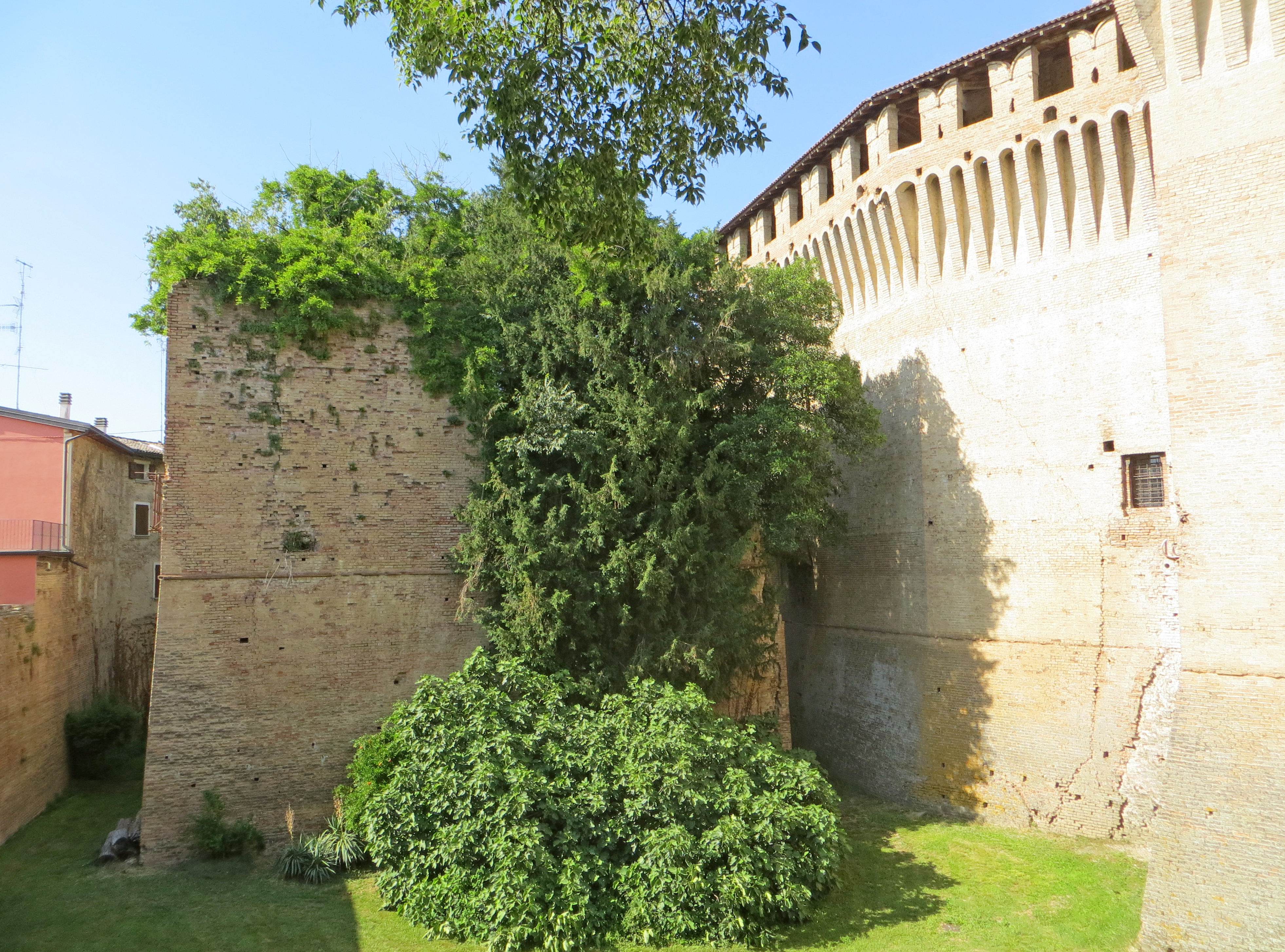 Castello (Montechiarugolo) - rivellino ovest